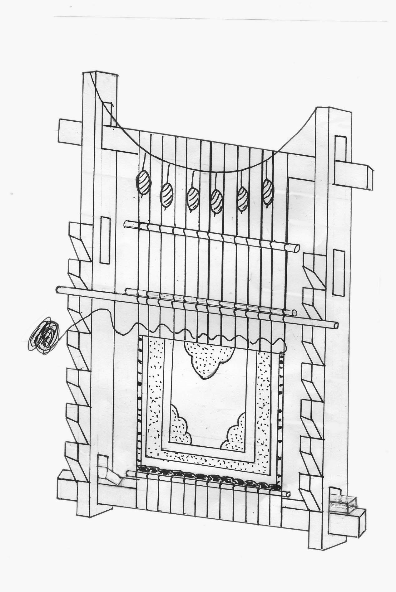 "Divar hanası" — Şaquli istiqamətdə, yuxarı hissəsi divara, aşağı hissəsi döşəməyə dayanan, xalça toxumaq üçün istifadə edilən toxucu dəzgah.